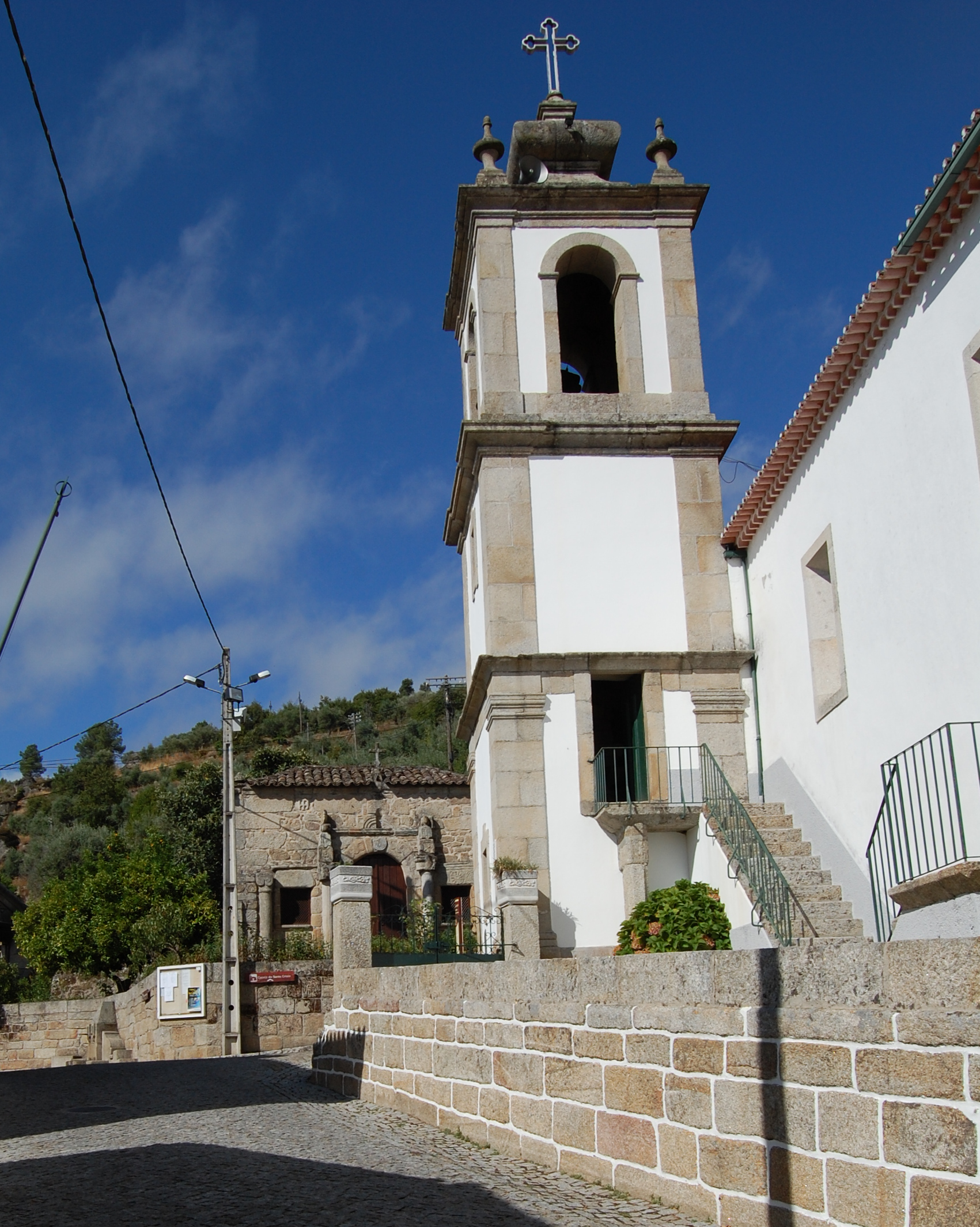 dois monumentos de sobral pichorro , Santo Cristo , et Igreja Matriz